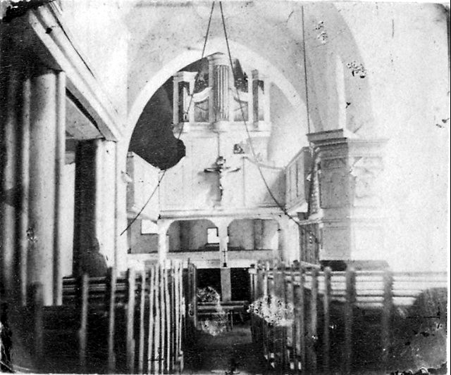 Innenaufnahme der alten Martinskirche in Heuchelheim bei Gießen, Hessen